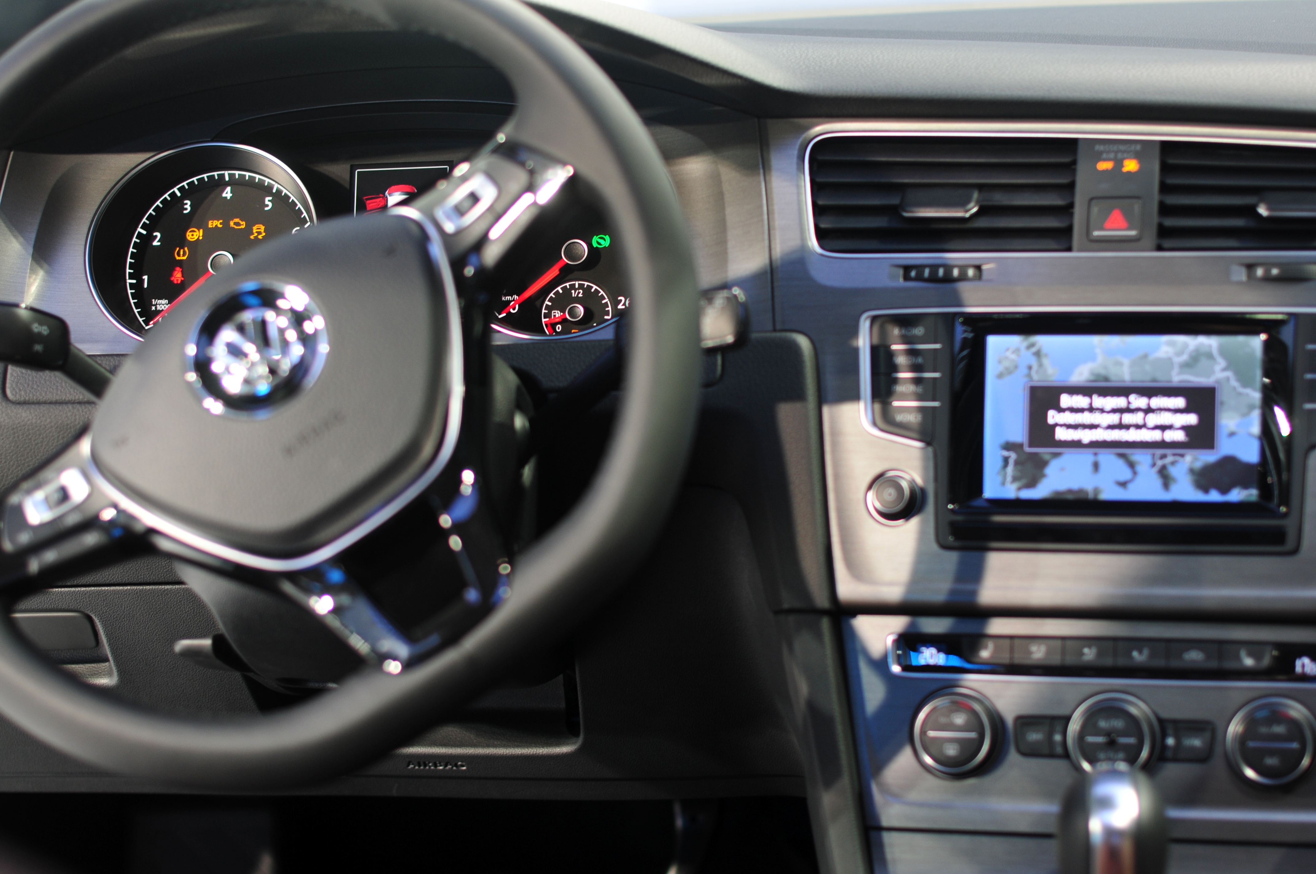 Autostadt Wolfsburg, Golf VII